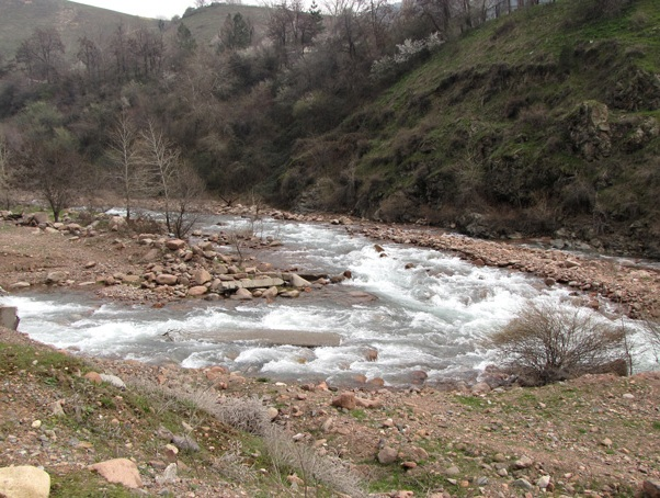 Река Дукентсай (на переднем плане) и её приток Каттасай близ города Янгиабад Ташкентского вилоята, Узбекистан